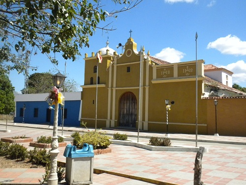 Parapara, Guárico, Venezuela. First posted in Caracas Chronicles, own work.